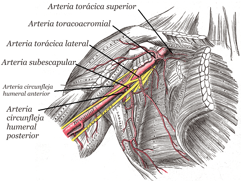 Ramas de la arteria axilar.